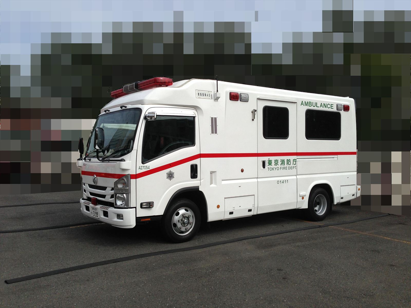 ・名称：東京消防庁特殊救急車Ⅲ型 ・製作担当：株式会社赤尾（ ・いすゞ自動車製 ＥＬＦをベースとした高規格救急車。 ・４ＷＤ駆動、エアーサスペンションを装備。 ・重体重の患者に備え、耐荷重の大きいストレッチャーと耐荷重の大きい防振架台VCS-01を装備。 ・陰圧装置を備え、外部からフレッシュエアを吸気し電気集塵の後に患者室へ供給する。 ・患者室内の空気は、HEPAフィルターを通してから車外に排出される。 その際に患者室内に陰圧が掛かる構造のため、二次感染を予防する構造となっている。